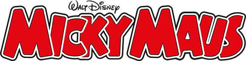 Micky Maus Magazin Logo